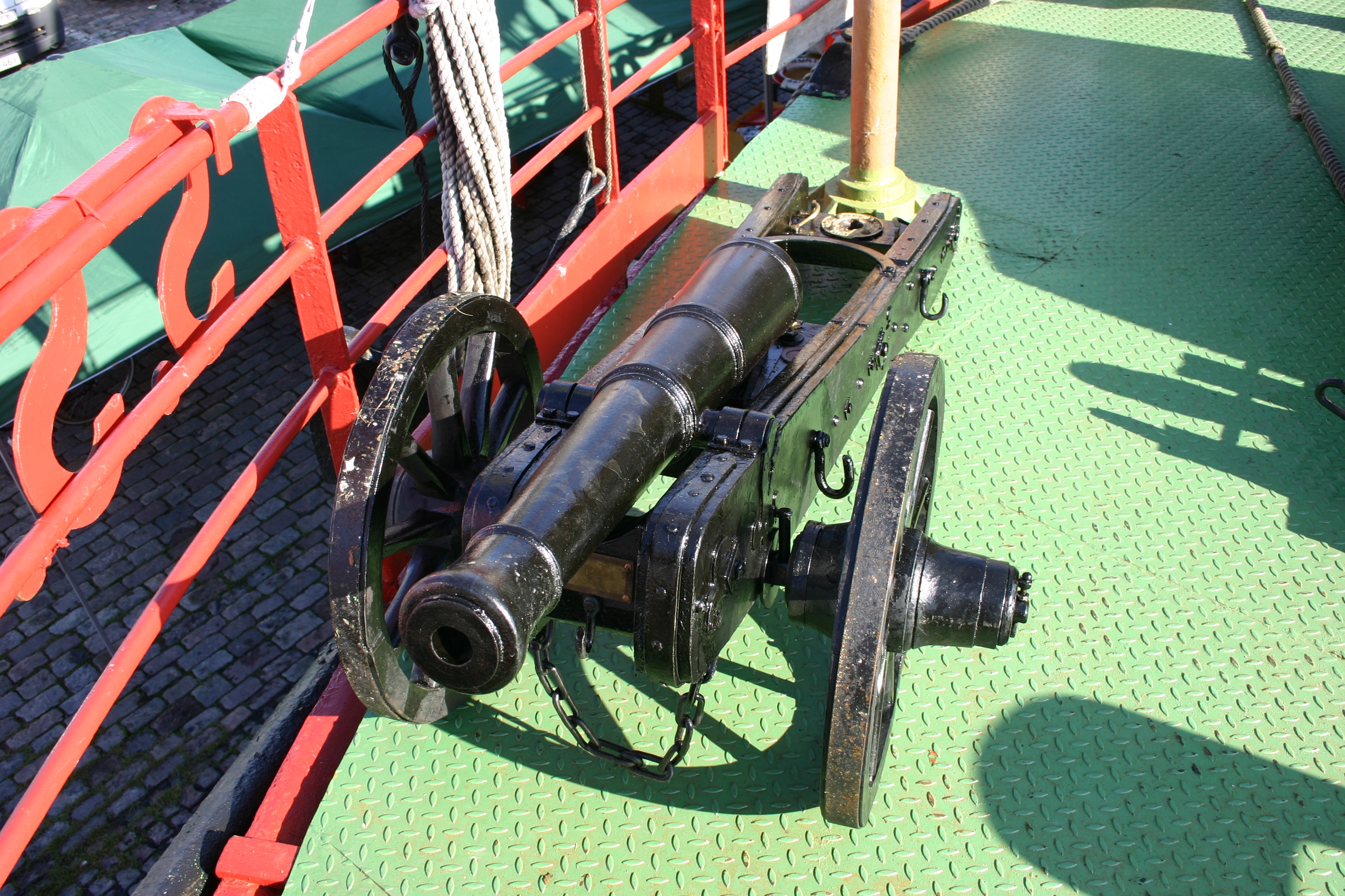 majakkalaiva Helsingin merkinantotykki